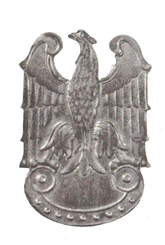 Orzełek Gwardii i Armii Ludowej